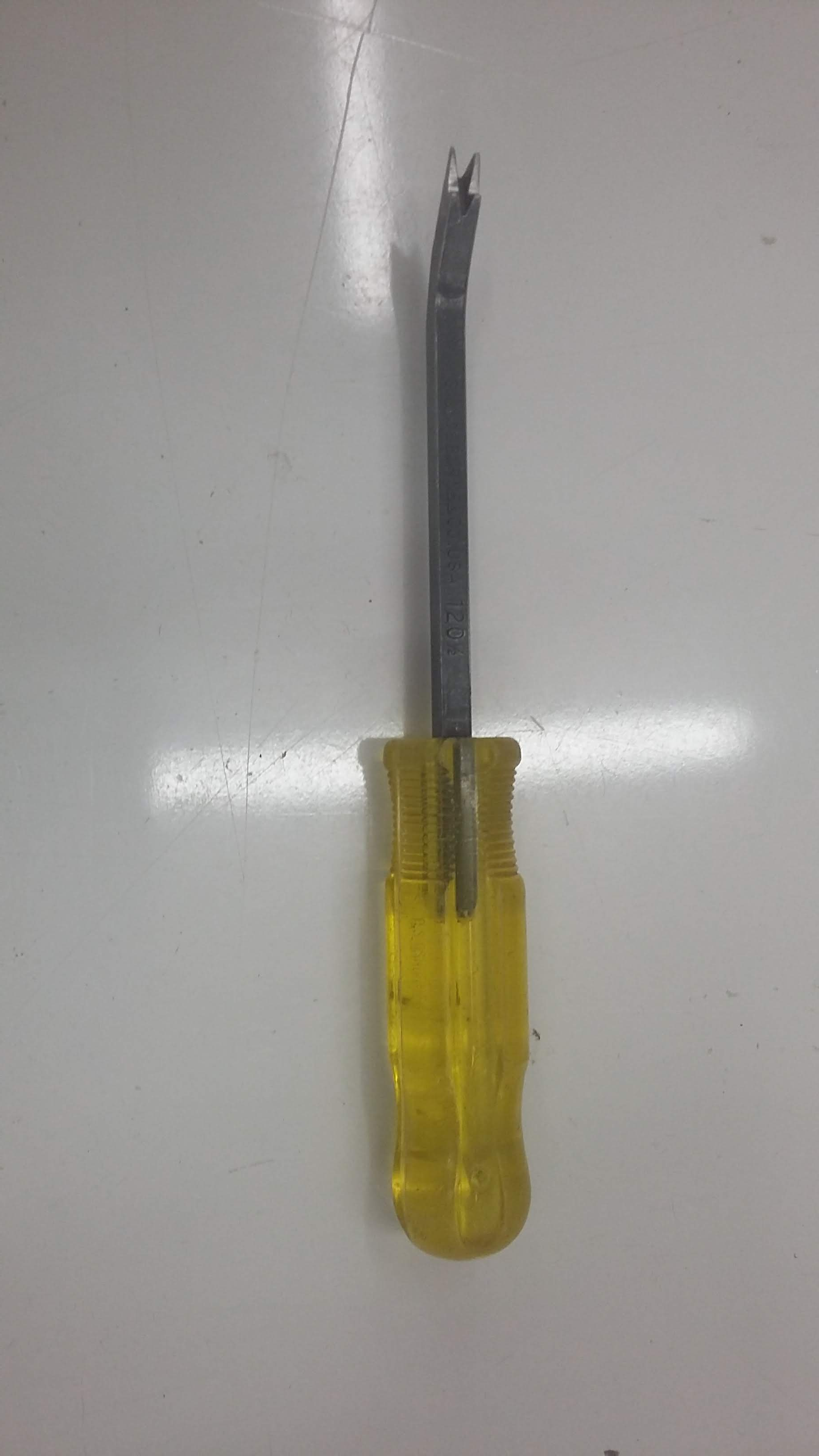 Arrache-agrafe